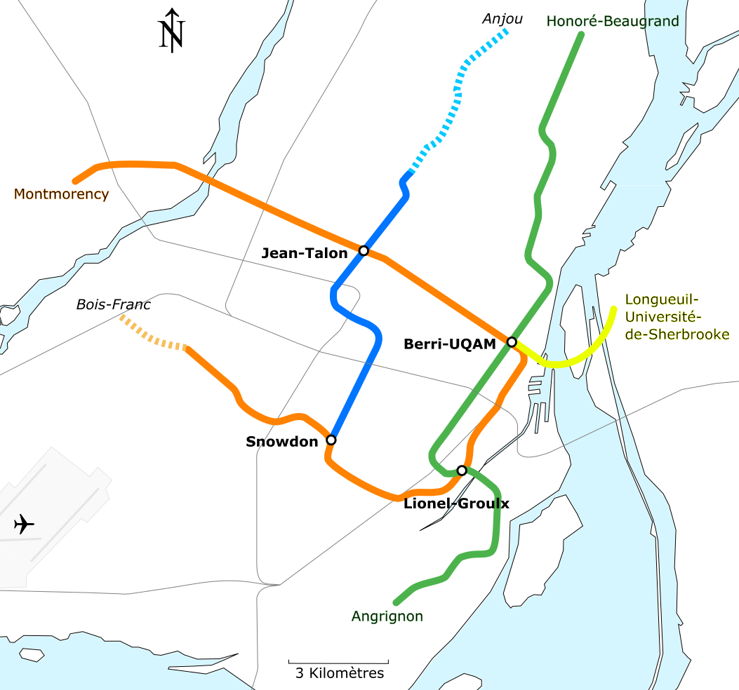 Carte géographiquement exacte des lignes du métro de Montréal et de ses extensions projetées. Sont aussi représentées les lignes de trains de banlieue.